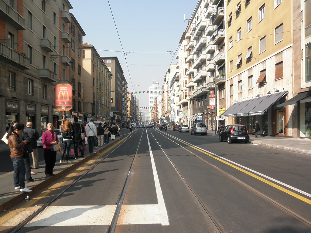 Fermata tranviaria a Milano in viale Tunisia.